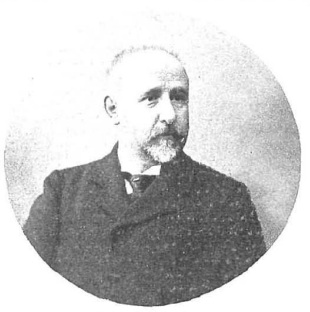 Blas Lázaro e Ibiza, catedrático de la Facultad de Farmacia. Fotografía de Manuel Compañy.